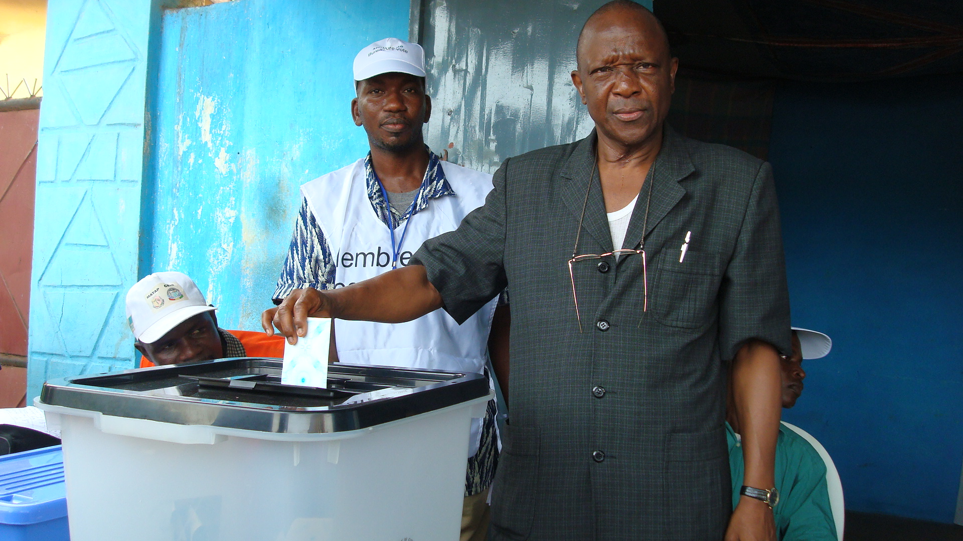 Ballot cast. Guinea vote 2007